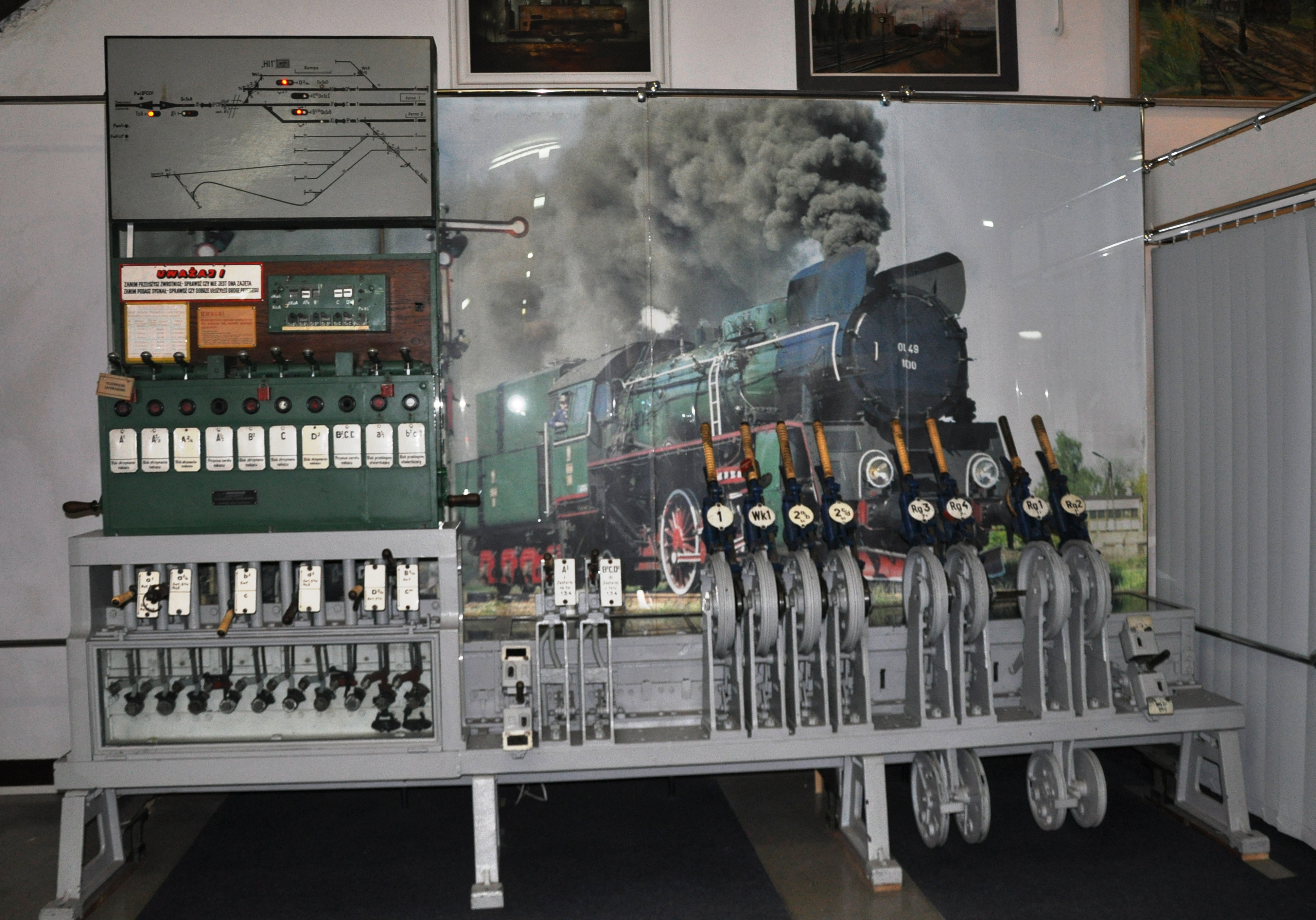 Muzeum Kolejnictwa w Warszawie. Widoczna na płachcie lokomotywa to Ol49-100